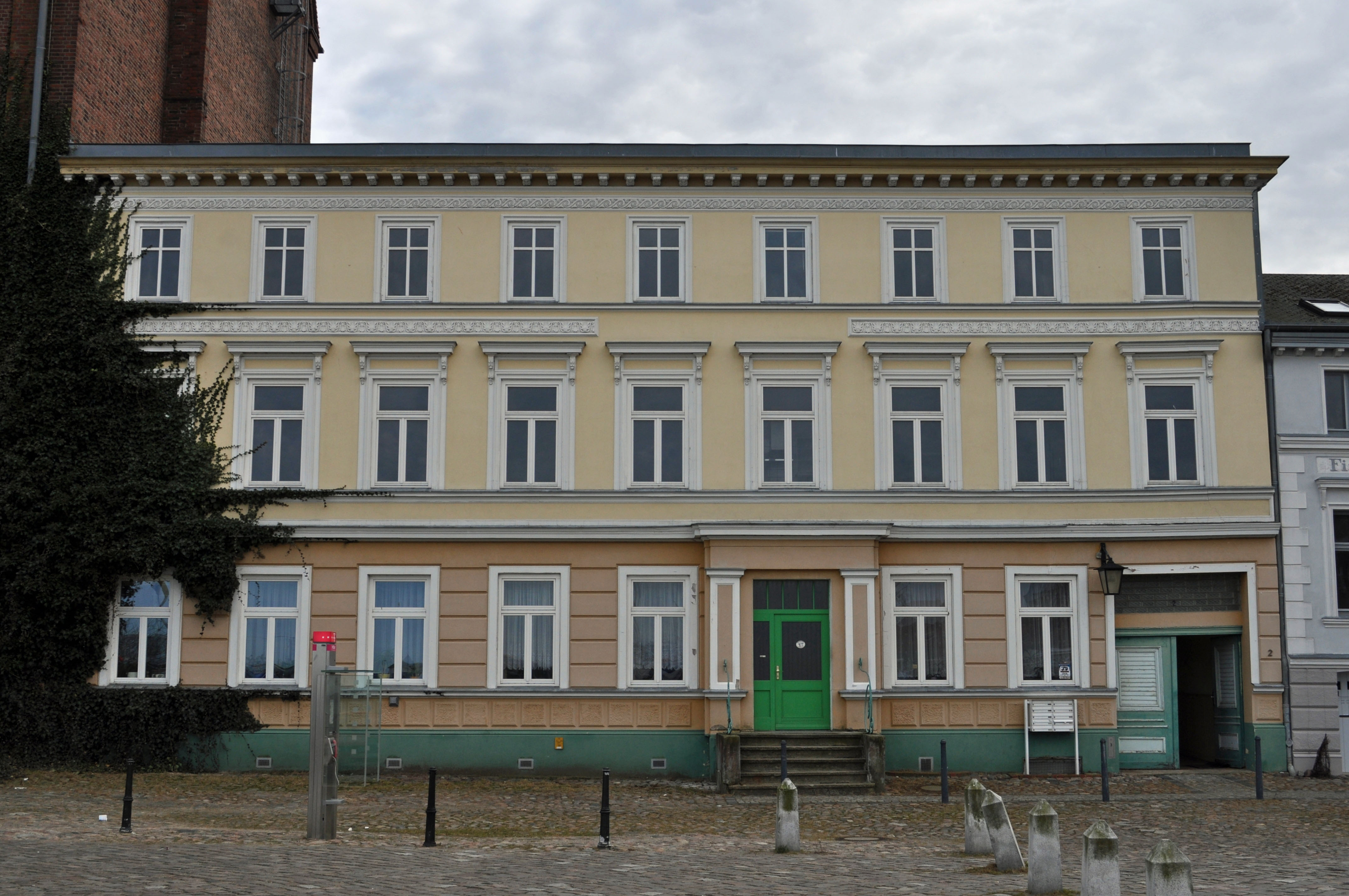 Gebäude bzw. Gebäudedetail in Stralsund. Straße und Hausnummer siehe Dateiname.